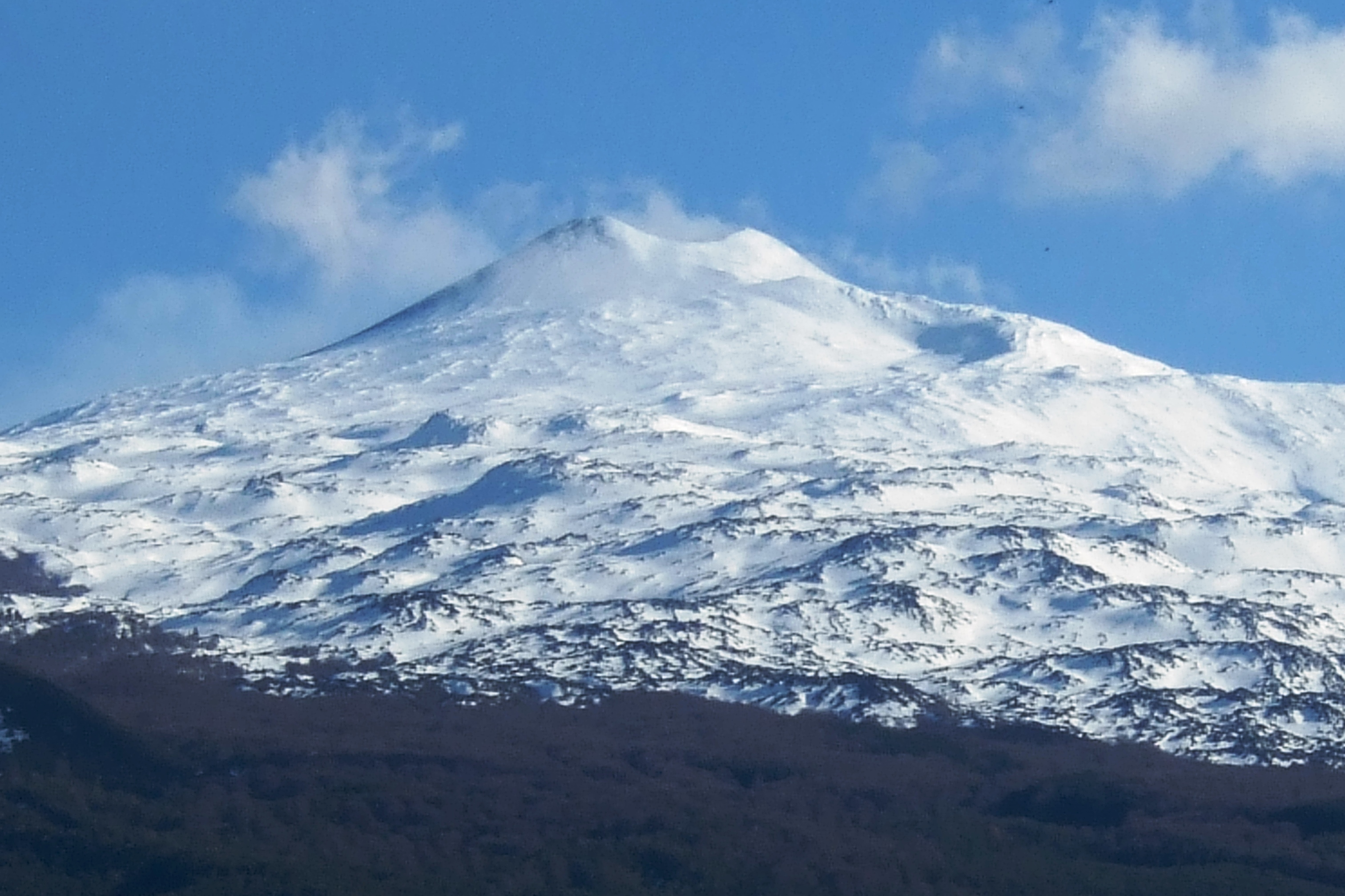 L'Etna vista dalla campagna di Randazzo